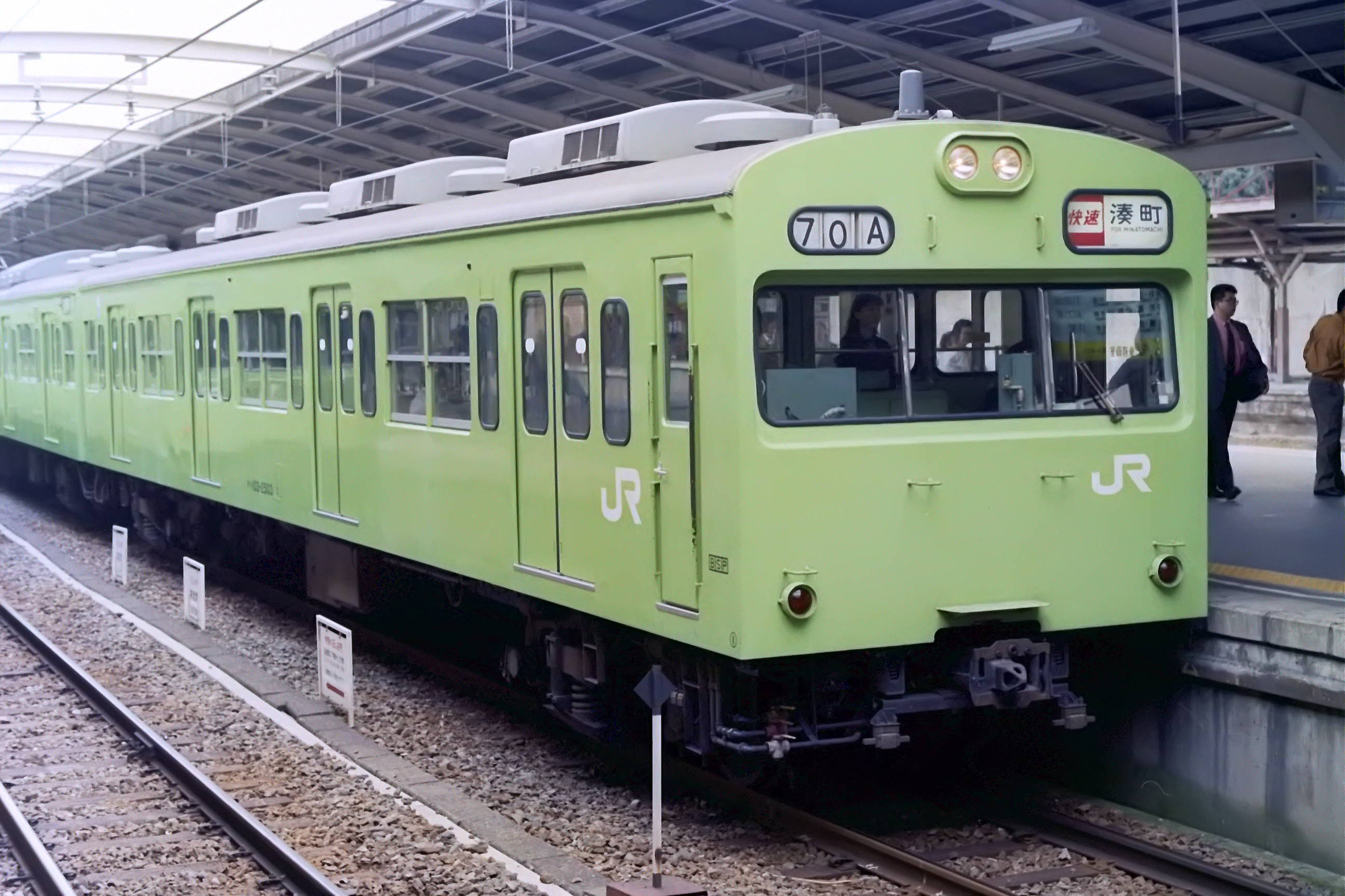 クハ103 2503